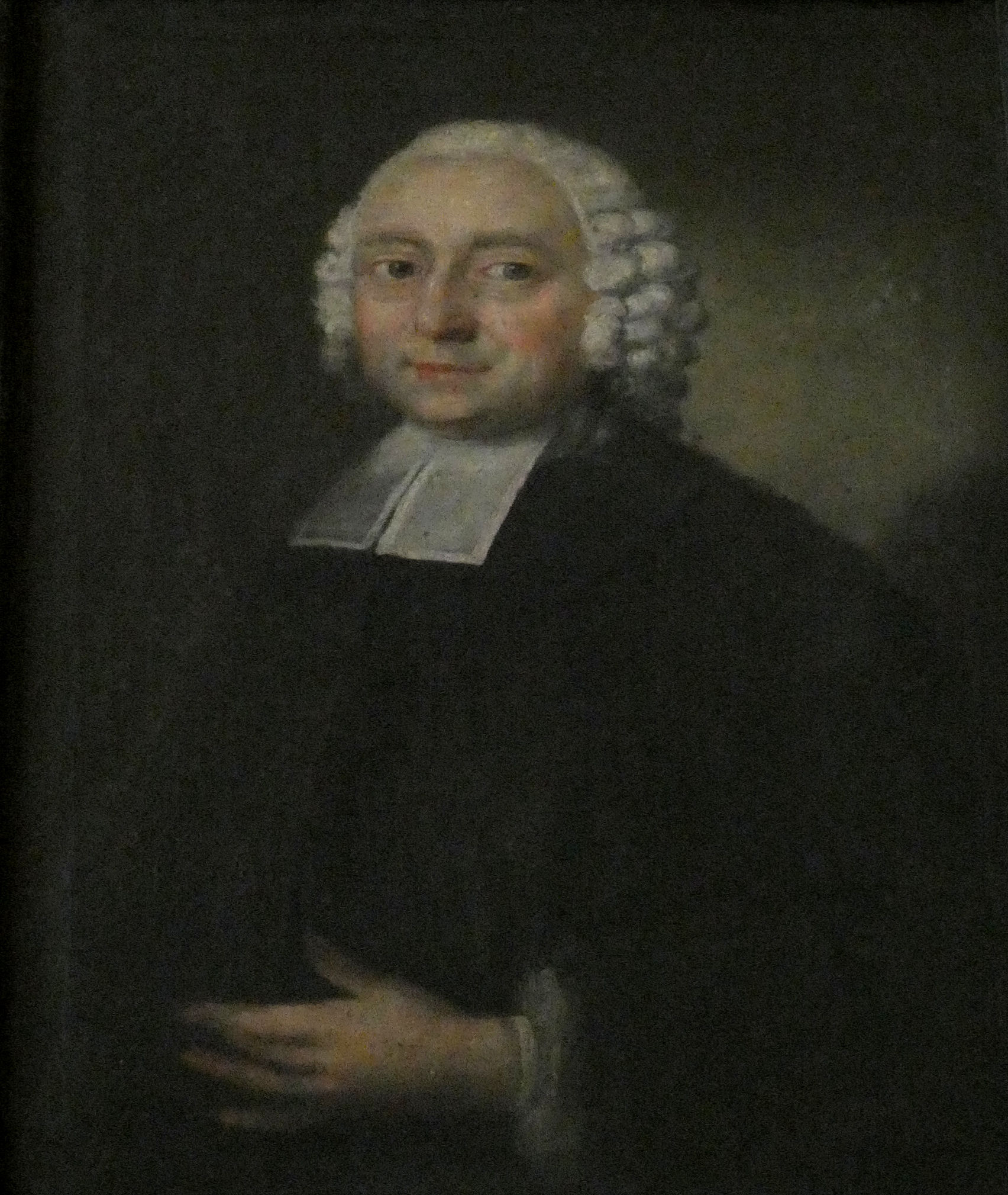 Fotografische Reproduktion (bearb.) eines Porträtgemäldes des Oberpfarrers der Marktkirche Halle Georg Ludwig Herrnschmidt